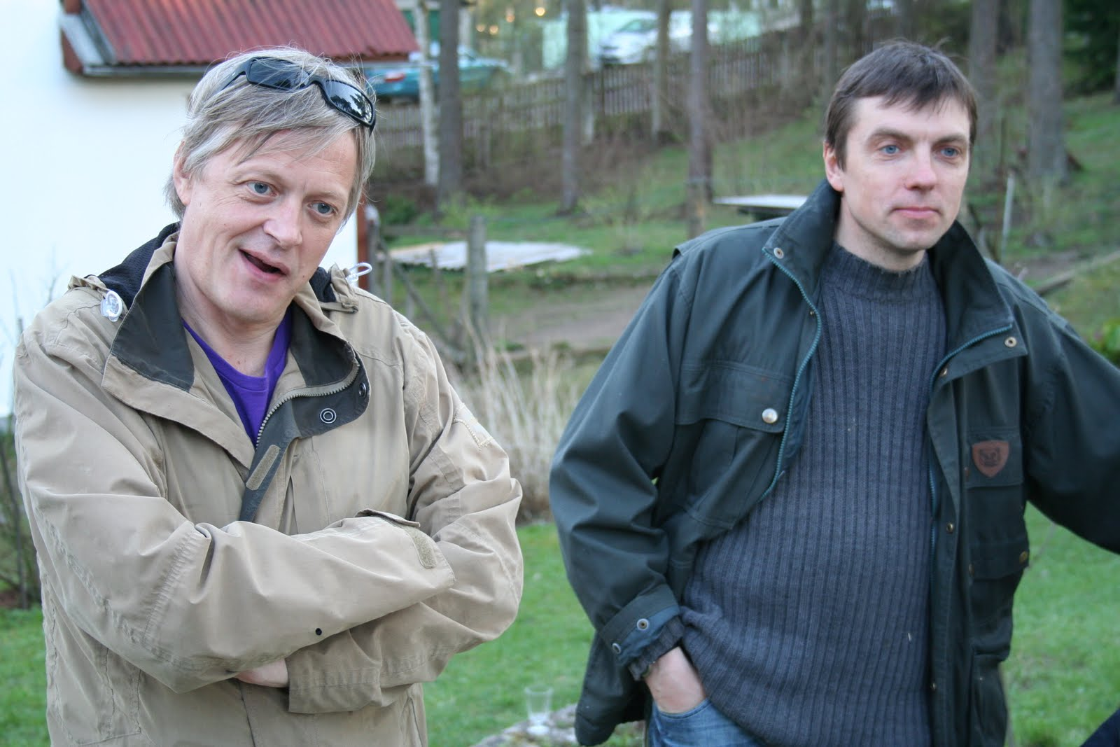 Margus Tabor ja Jaanus Vaiksoo lastesaate "Saame kokku Tomi juures" viimase osa võttepäeval.